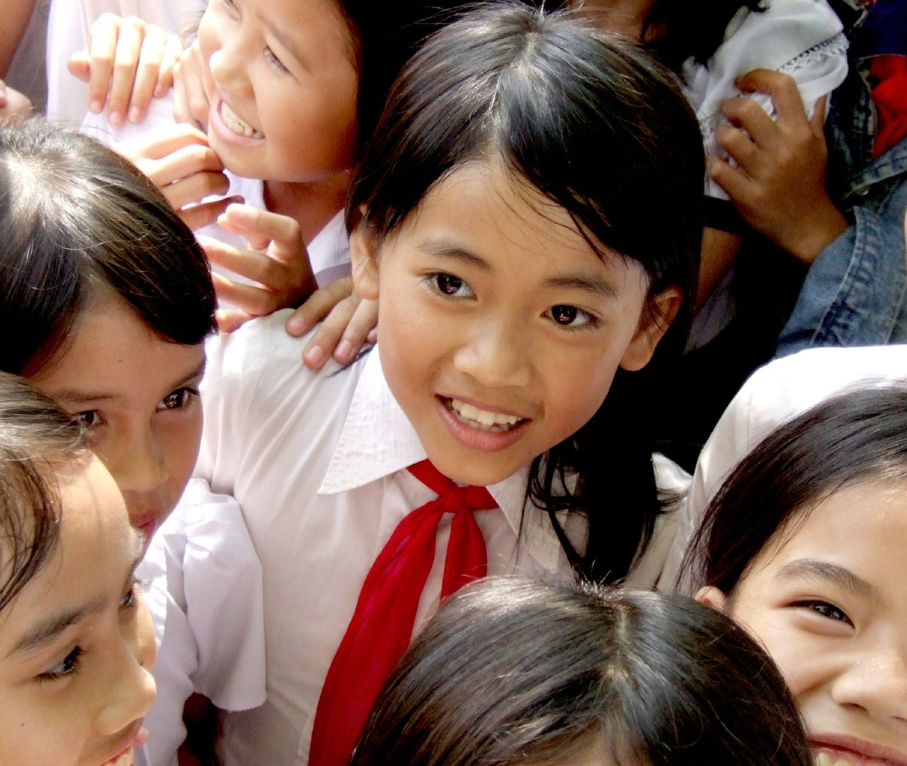 Da Nang Smile - 4